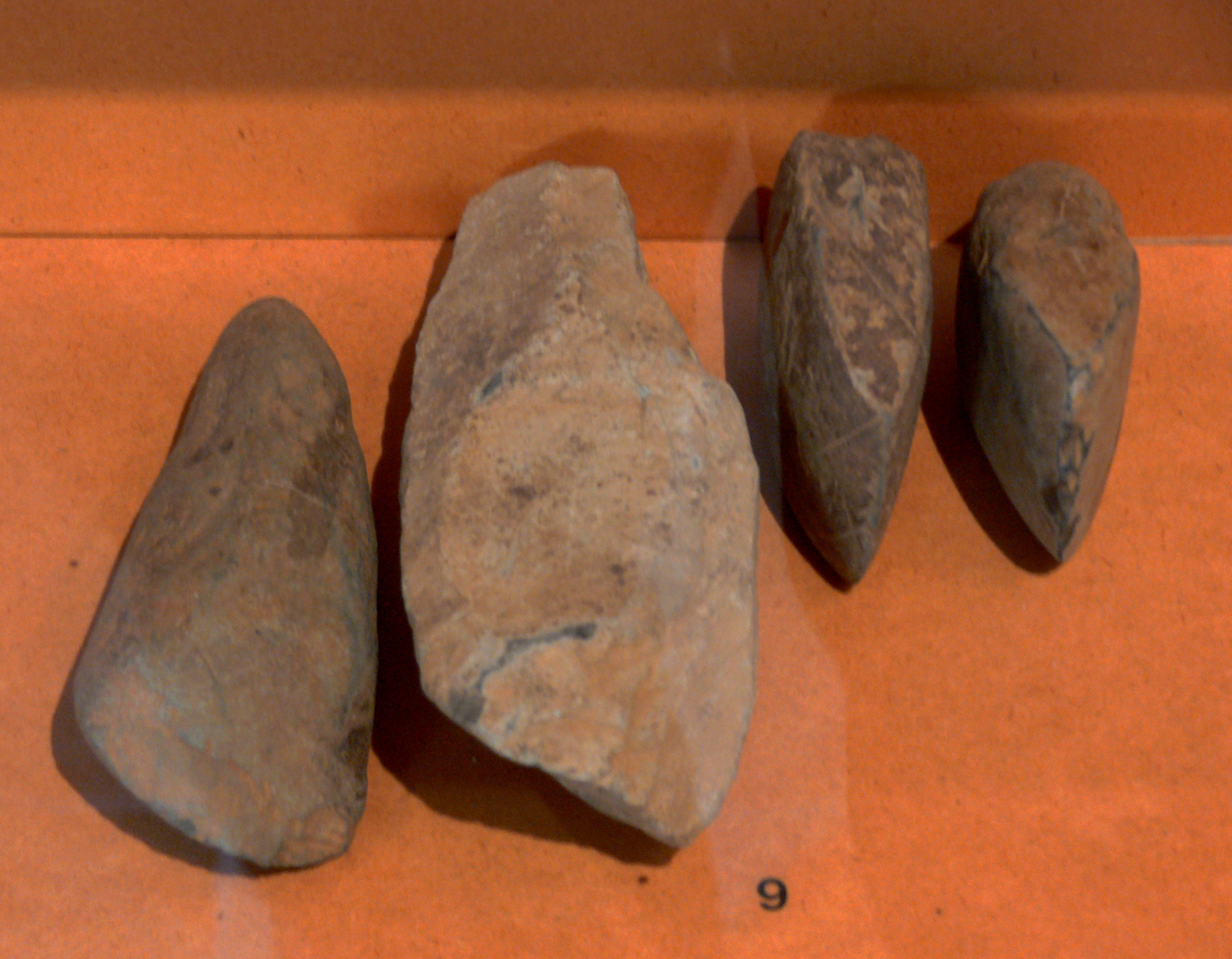 Ebauches de haches et haches polies du néolithique découverts lors de sondages au « camp de César » à Chariez (Haute-Saône) effectués par la Salsa. Vesoul, musée Georges-Garret